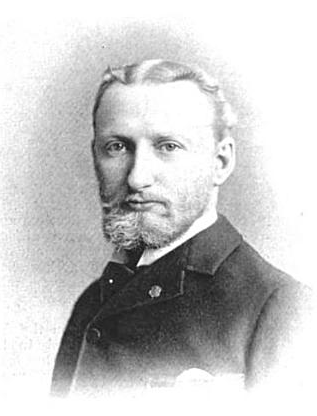 Depicted person: Bartow Sumter Weeks – American judge